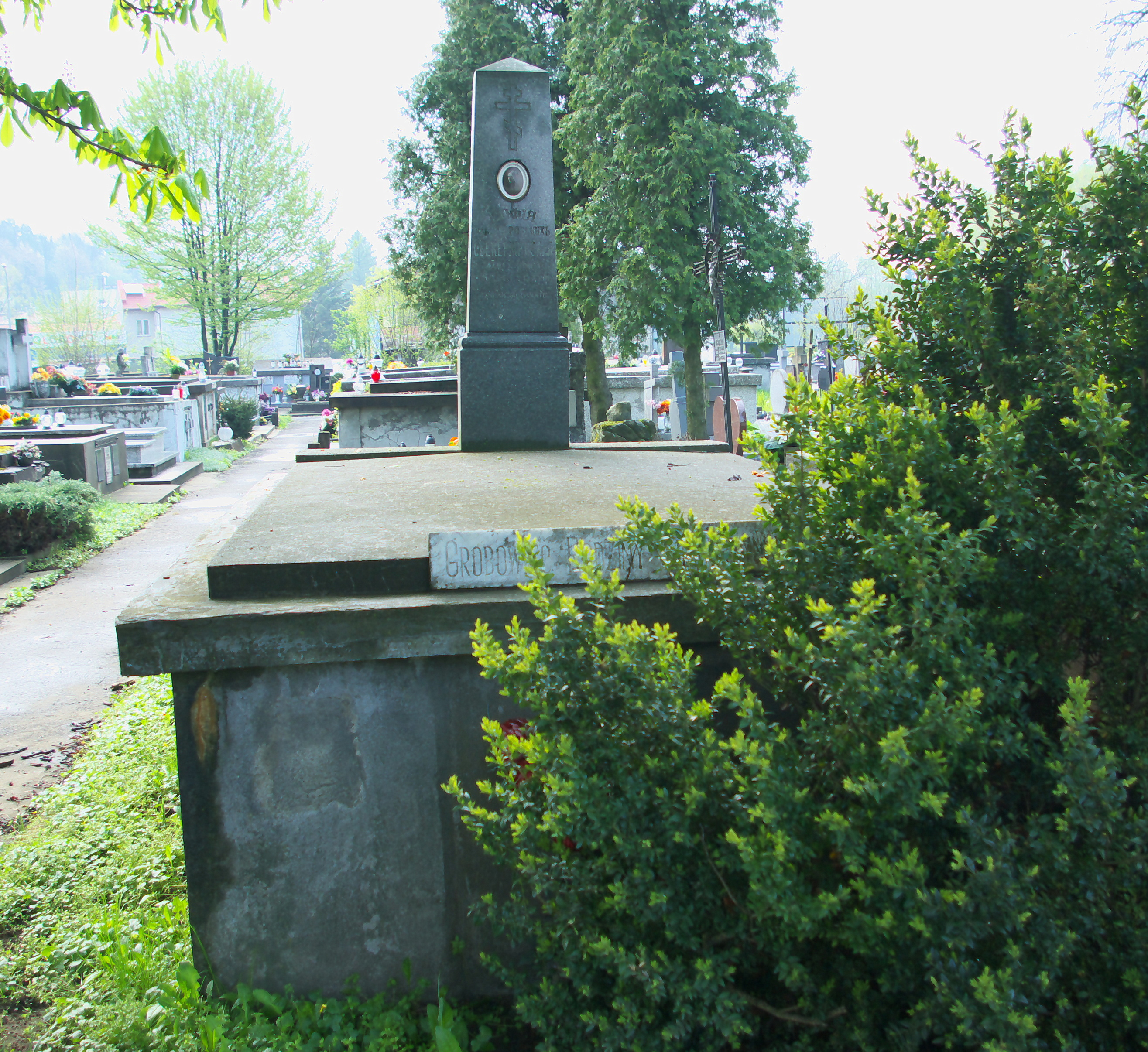 Grobowiec rodziny Siekierzyńskich (Józef i Maria) na Cmentarzu Centralnym w Sanoku.